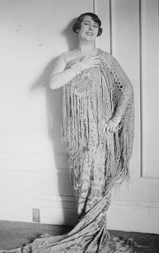 Elvira de Hidalgo (1891 - 1980), Spanish coloratura soprano, singing teacher